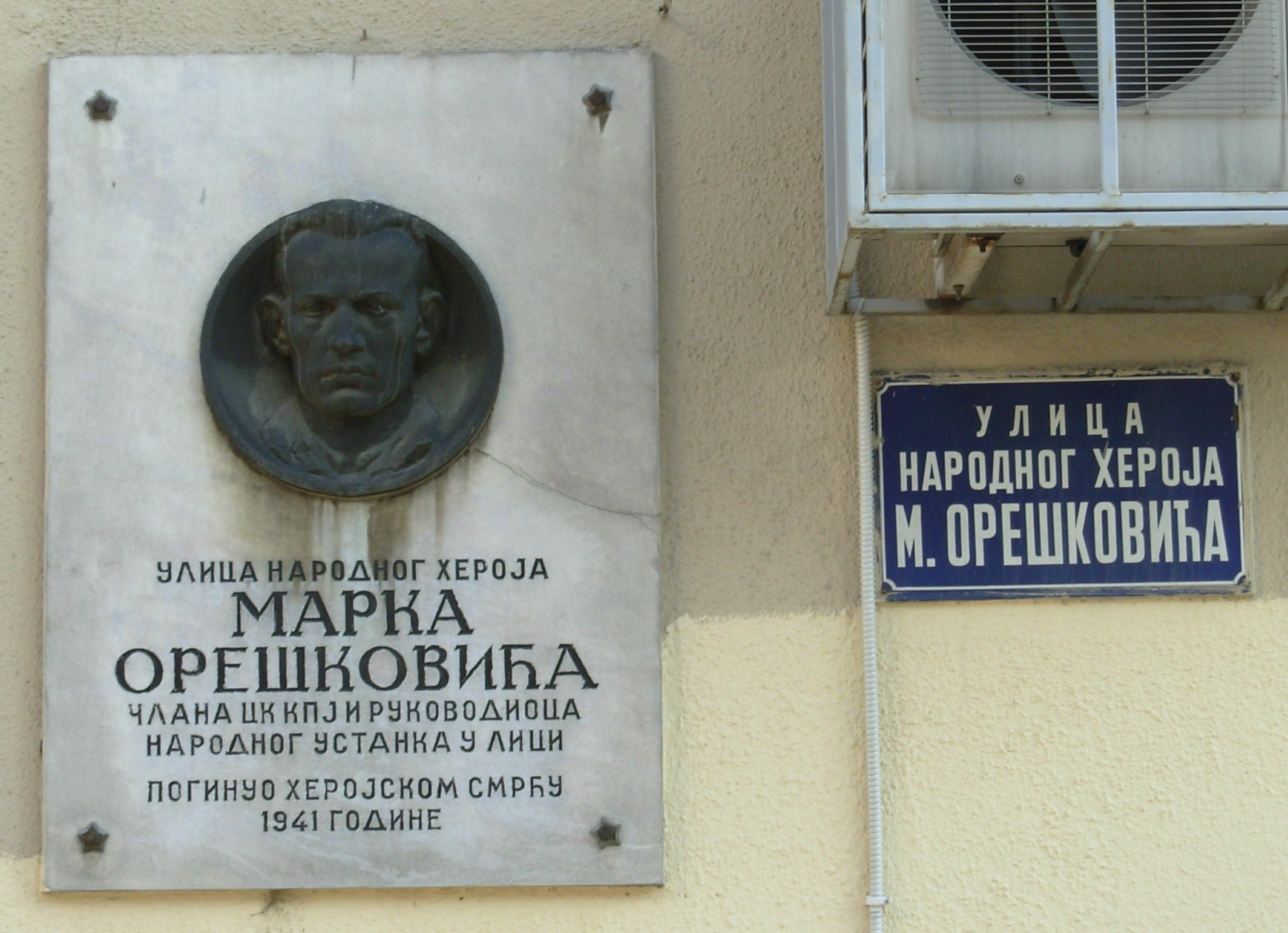 Tabla u ulici Marka Oreškovića, Beograd. Slikao Goldfinger